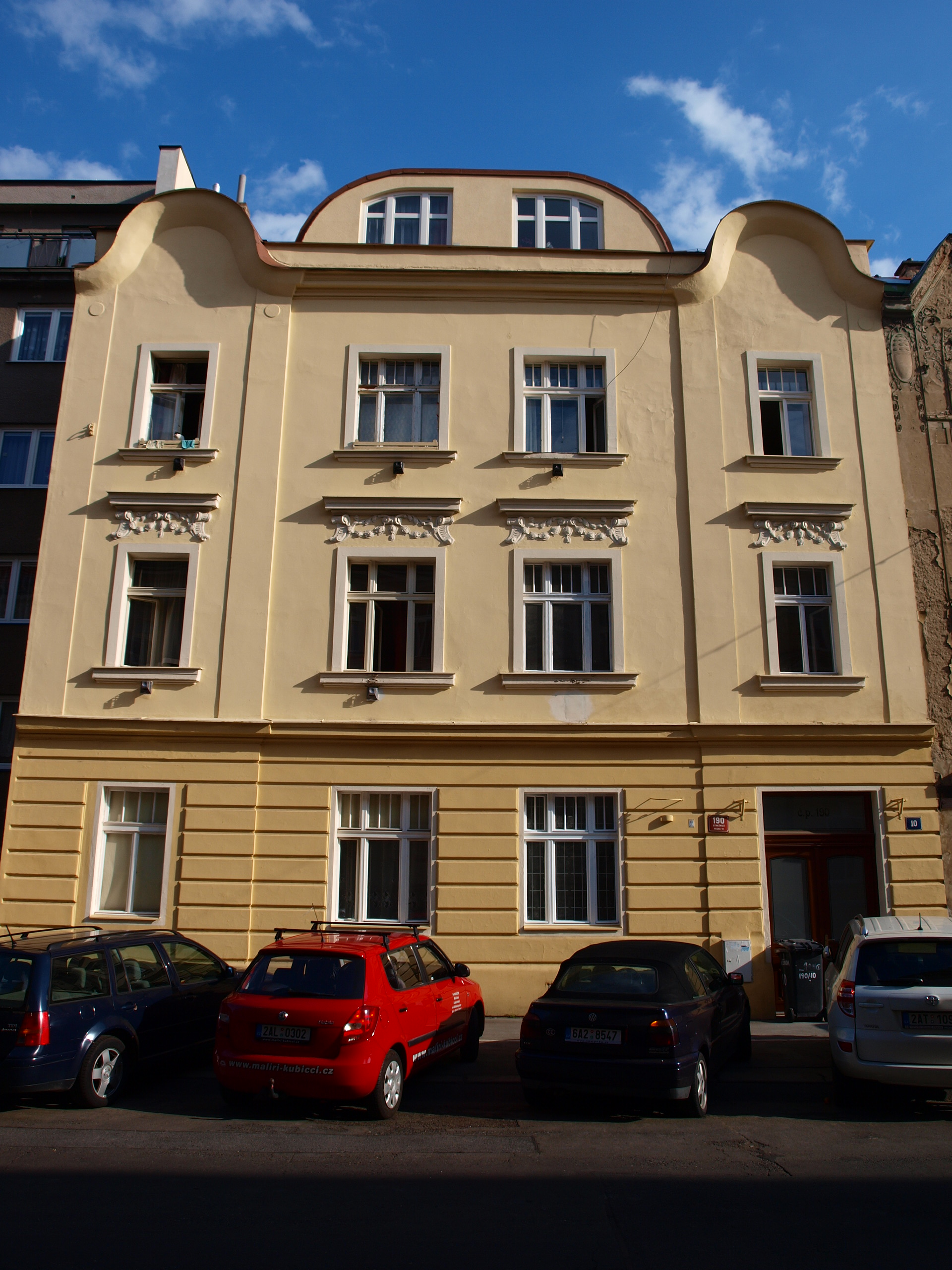 Strašnické domy